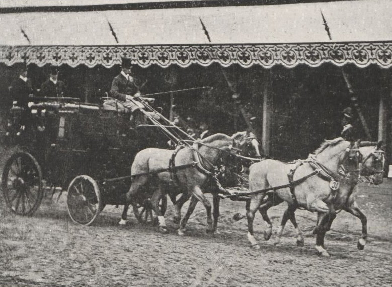 P361 : Mail de M. Le Baron de Zuylen de Nyevelt conduit par le comte de la Mazelière - Concours hippique international de 1900 / Jeux Olympiques de 1900